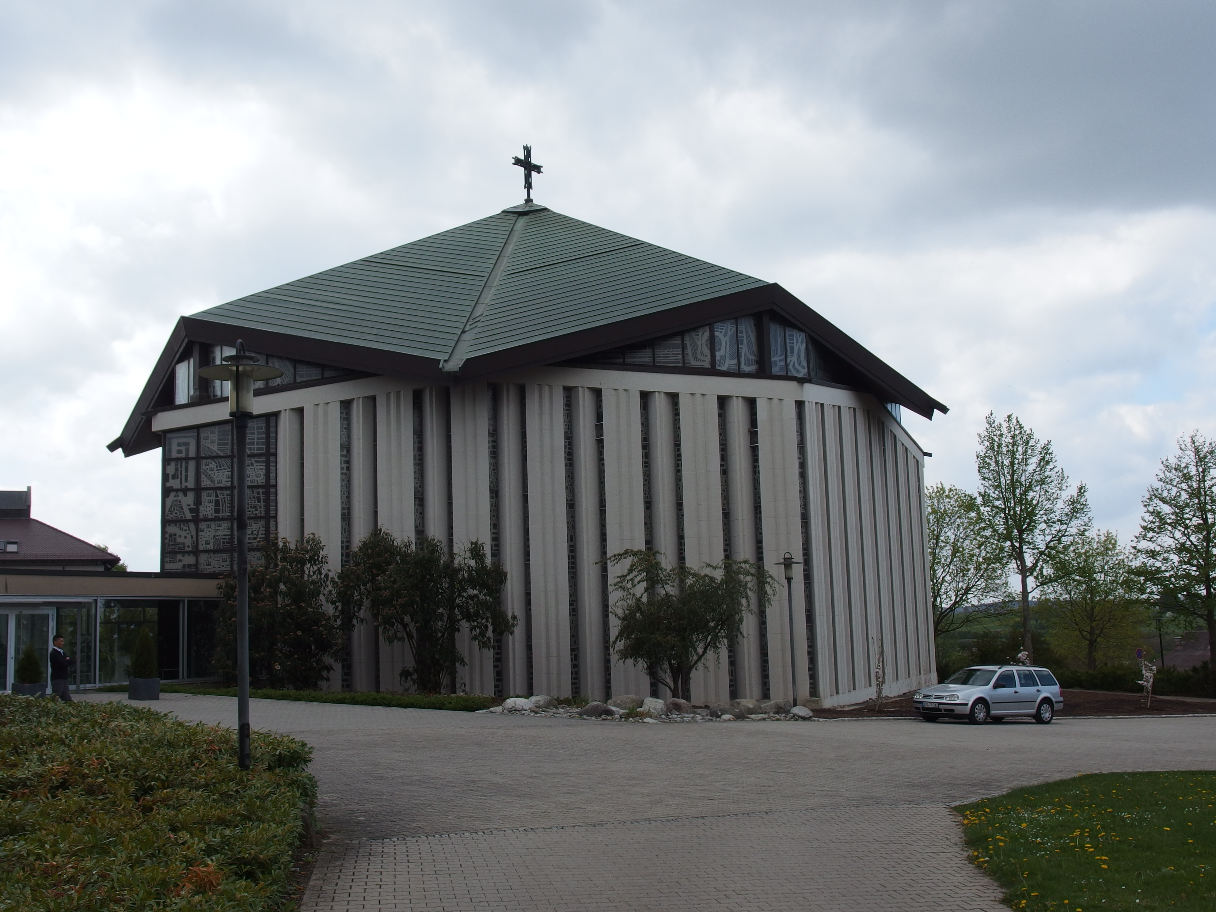 Kirche Maria Königin, Liebfrauenhöhe, Rottenburg am Neckar